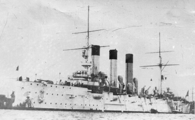 Бронепалубный крейсер "Аврора", до сентября 1903 года